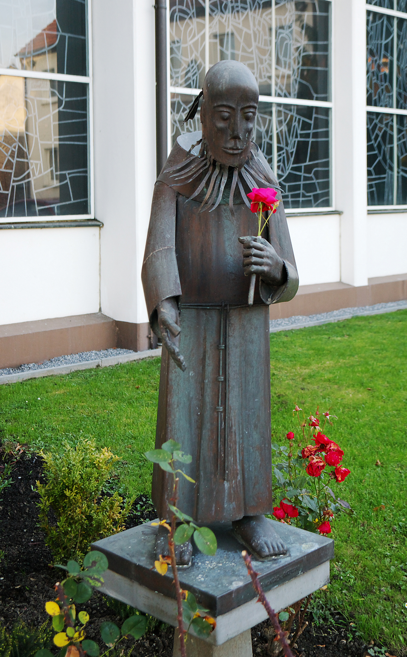 Katholische Kirche St. Konrad in Fröndenberg-Langschede, Nordrhein-Westfalen, Deutschland. Apostelfigur am Haupteingang.